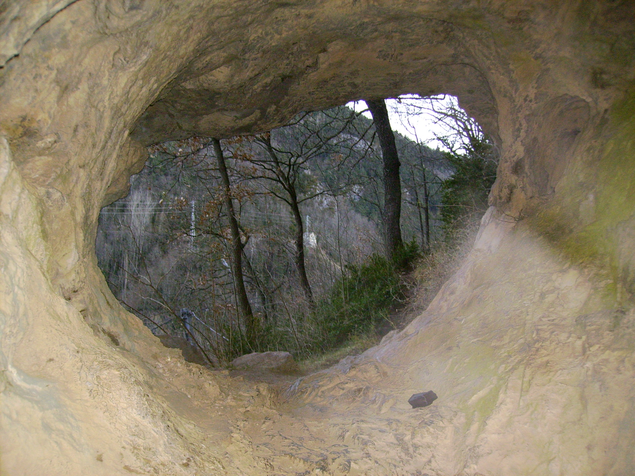 Coves de les Encantades de Rialb